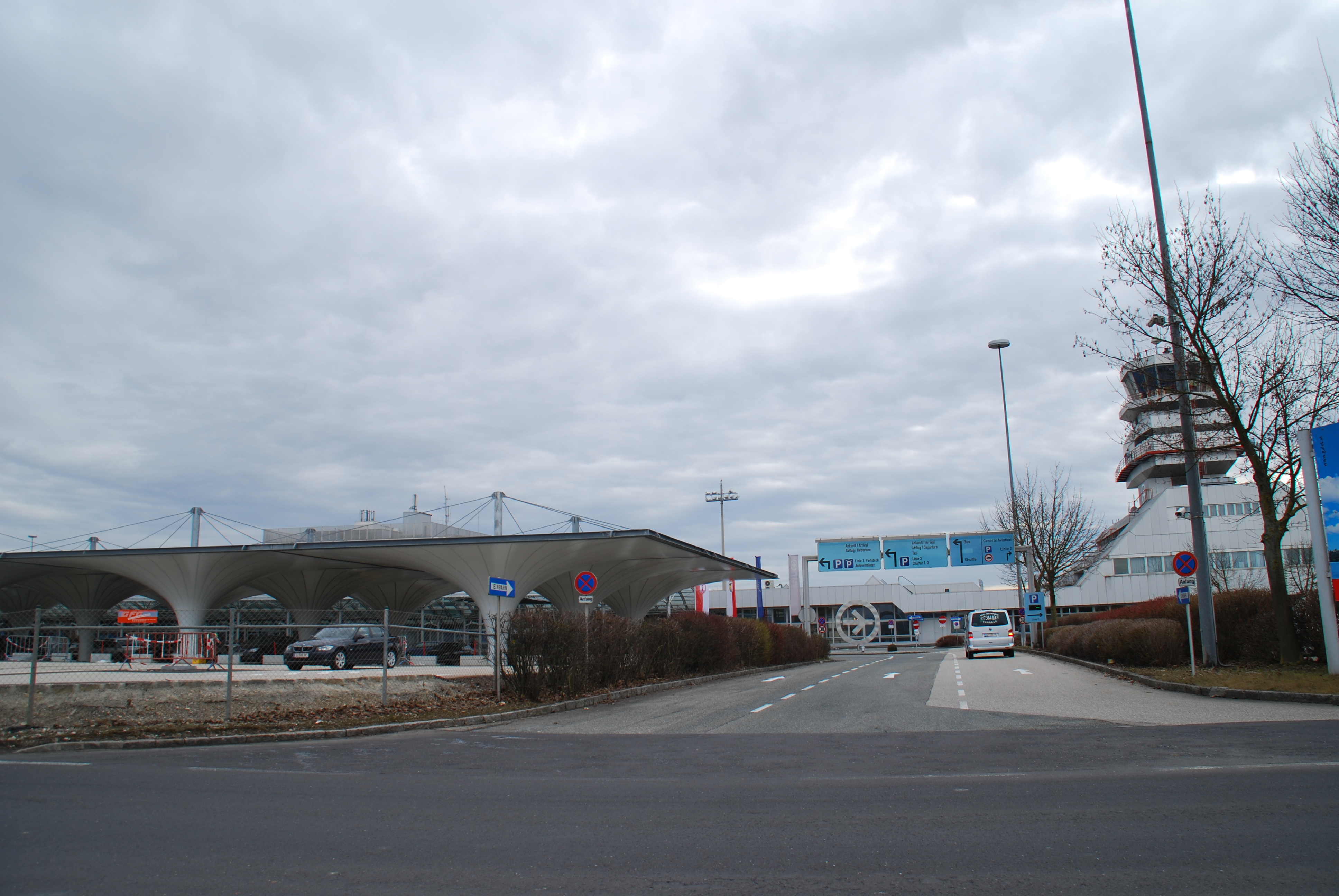 Blick auf den Flughafen